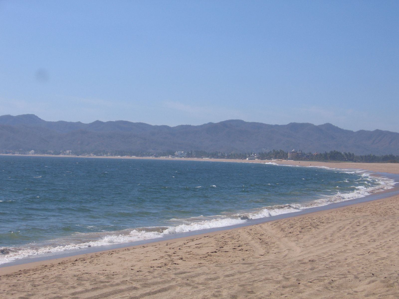 Barra de Navidad, un pueblo pesquero entre Vallarta y Manzanillo